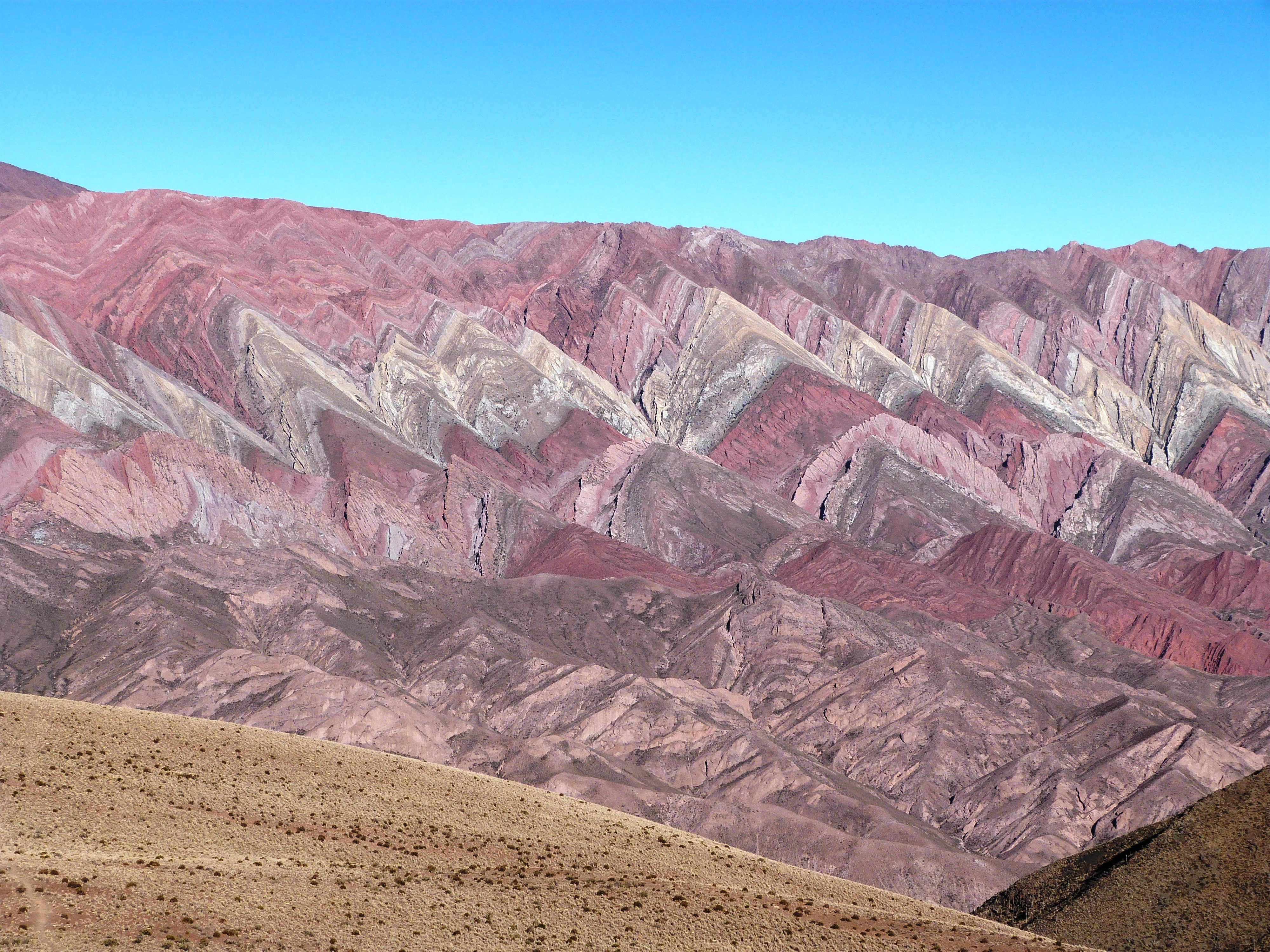 MIKEMDP